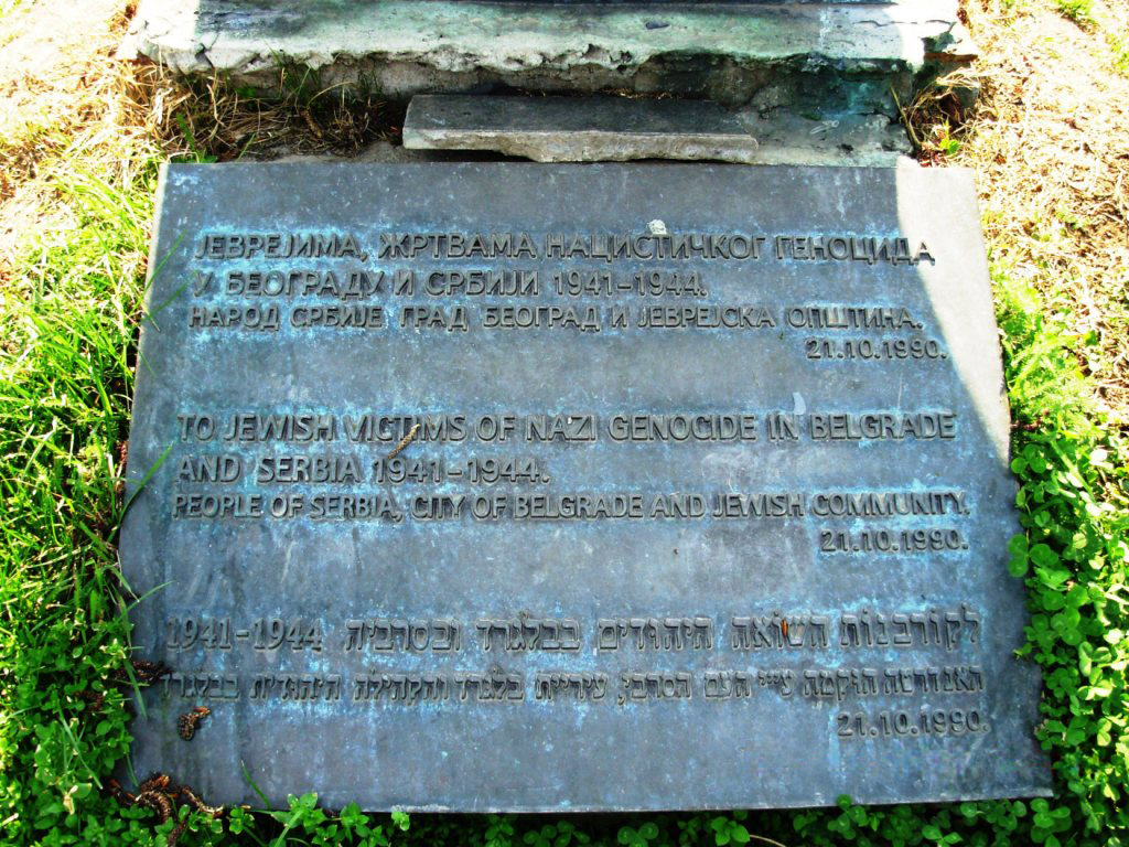 Tabla sa spomenika jevrejskim žrtvama nacističkog genocida u Beogradu. Slikao Goldfinger